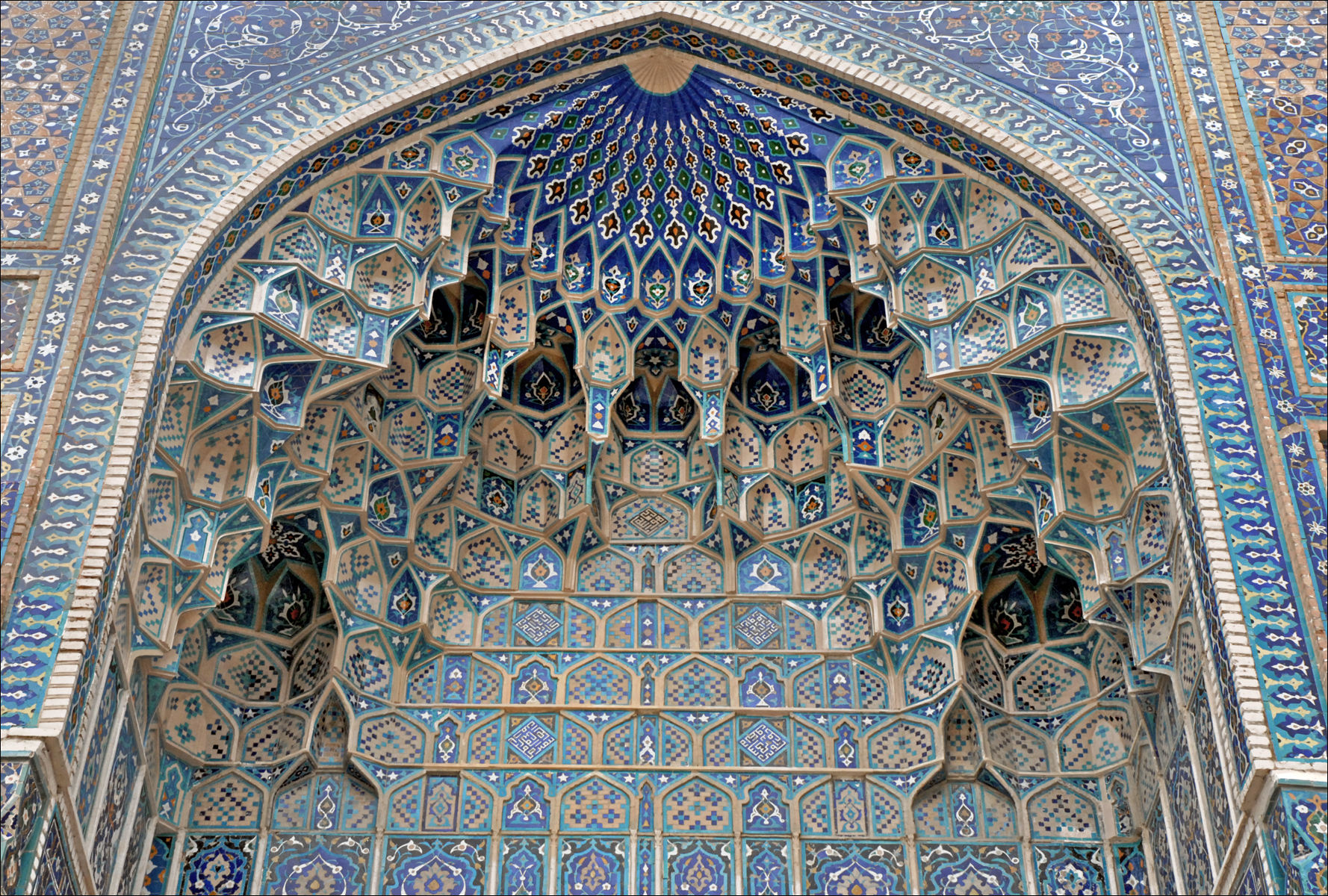 Le Gour Emir est le mausolée de Tamerlan, dont la République d'Ouzbékistan (d'après l'URSS), a fait un symbole de grandeur et d'indépendance. Les statues de Tamerlan, un conquérant sanguinaire et impérialiste, dans la lignée de Gengis Khan, ont ainsi remplacé celles de Lénine ou de Staline sur toutes les grandes places des cités. Le mausolée Gour Emir) a été construit en 1401 par le petit-fils de Tamerlan, qui y est enterré comme son grand-père et d'autres membres de la famille timouride. Il est somptueusement décoré. A l'origine, le mausolée comprenait également une madrasa (école coranique) et une khanaka (résidence des derviches) situées autour d'une cour centrale. Seul le portail et le mausolée de l'ensemble existent encore. Ils ont été restaurés et l'environnement a été dégagé des habitations secondaires. Le portail est l'oeuvre d'un persan Mohamed, fils de Mahmoud, ramené de force de Perse par Tamerlan à la suite de ses conquêtes comme la plupart des architectes et artisans qui ont construit Samarcande. Le style architectural des monuments de Samarcande est de fait très voisin de celui des grands monuments perses, avec néanmoins des caractéristiques esthétiques régionales à Samarcande, Boukhara ou Khiva.